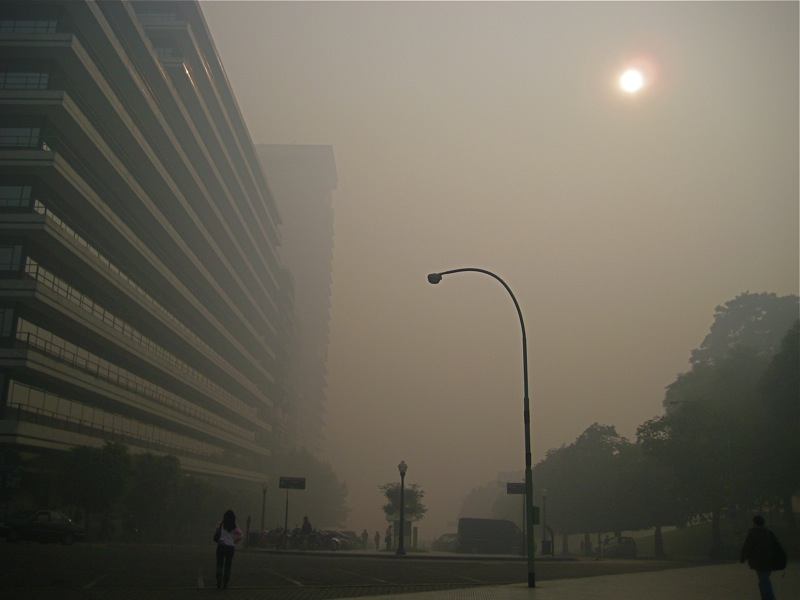 Plaza San Martin ... cof cof. Humareda en Buenos Aires causada por los incendios de pastizales en el Delta del Paraná.